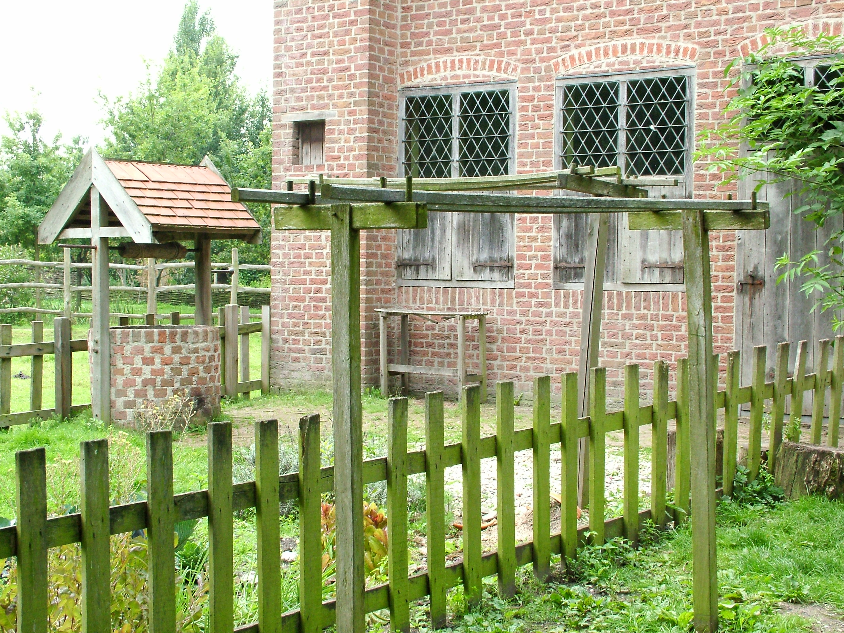 Archeon, Alphen aan den Rijn: Een achtertuin uit de middeleeuwen